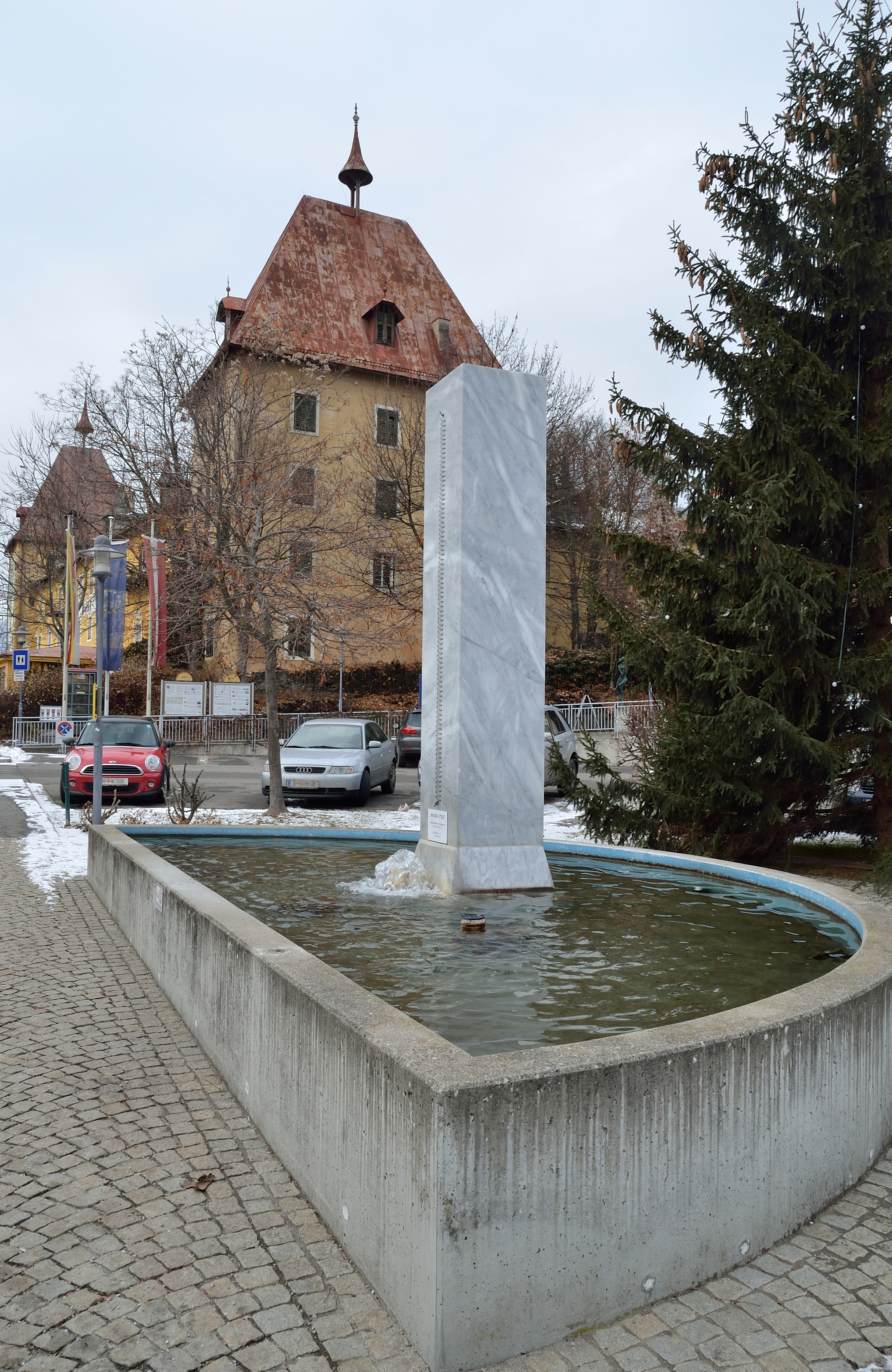 Wasser-Stele von Michael Kos, vernähter Marmor mit Wasserlauf, ein Brunnen in Millstatt. Dahinter Hotel Lindenhof, Hochmeisterschloss.